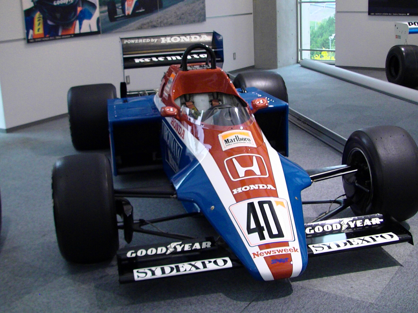 Honda Collection Hallにて撮影。